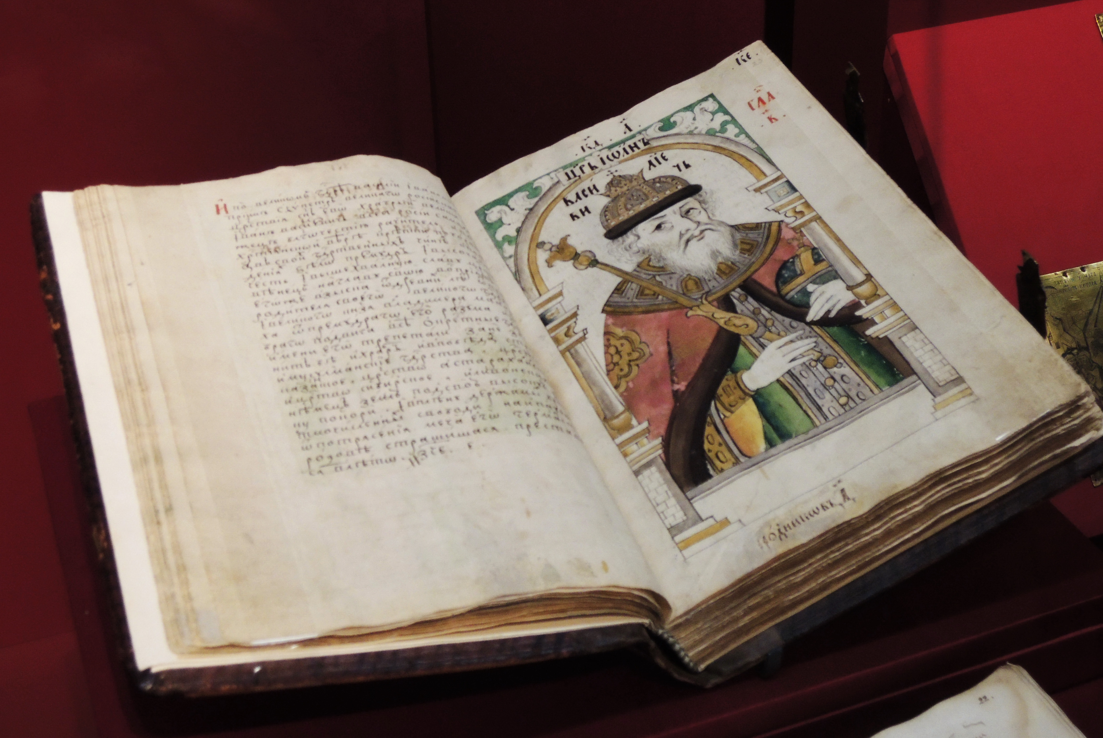 Титулярник (1691—1697)